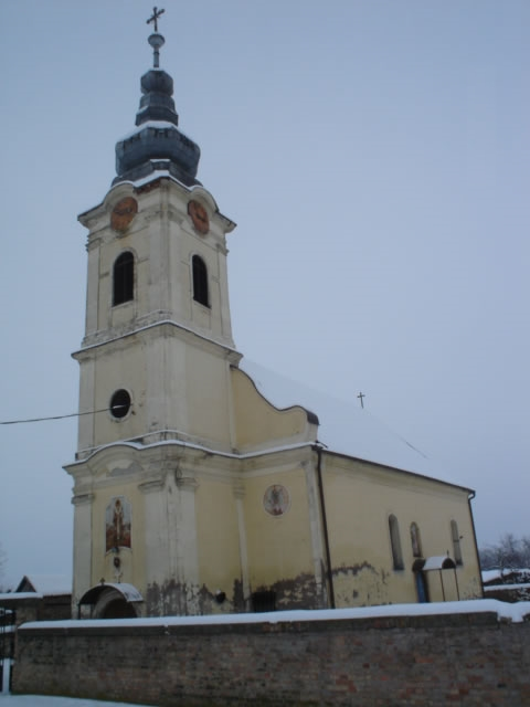 Serb Orthodox Church in Jagodnjak